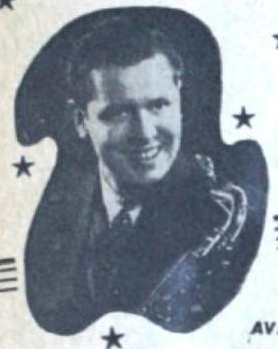 Johnny Gilbert